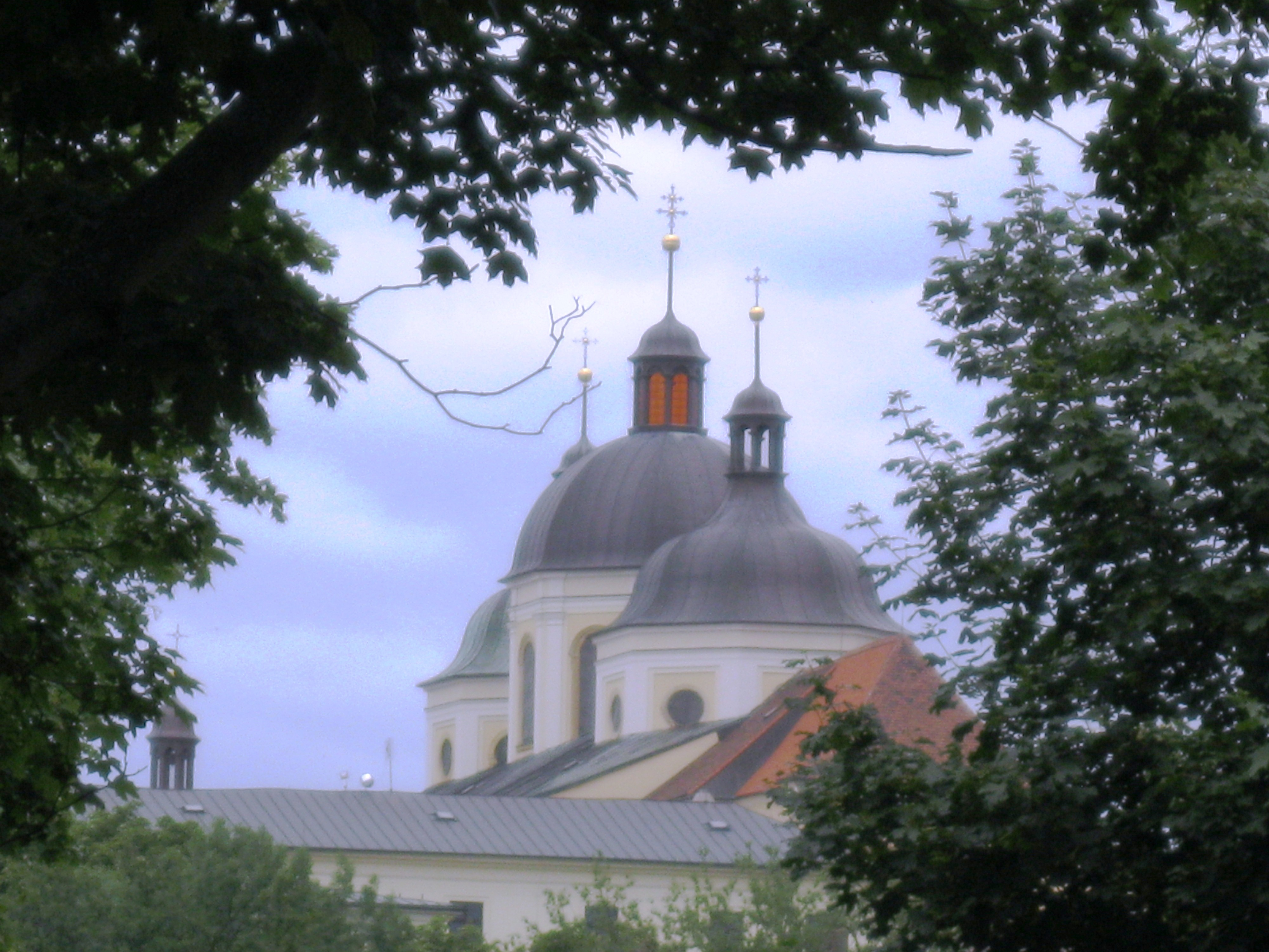 Klášter dominikánský (Olomouc), Žerotínovo nám. 220/1, Olomouc